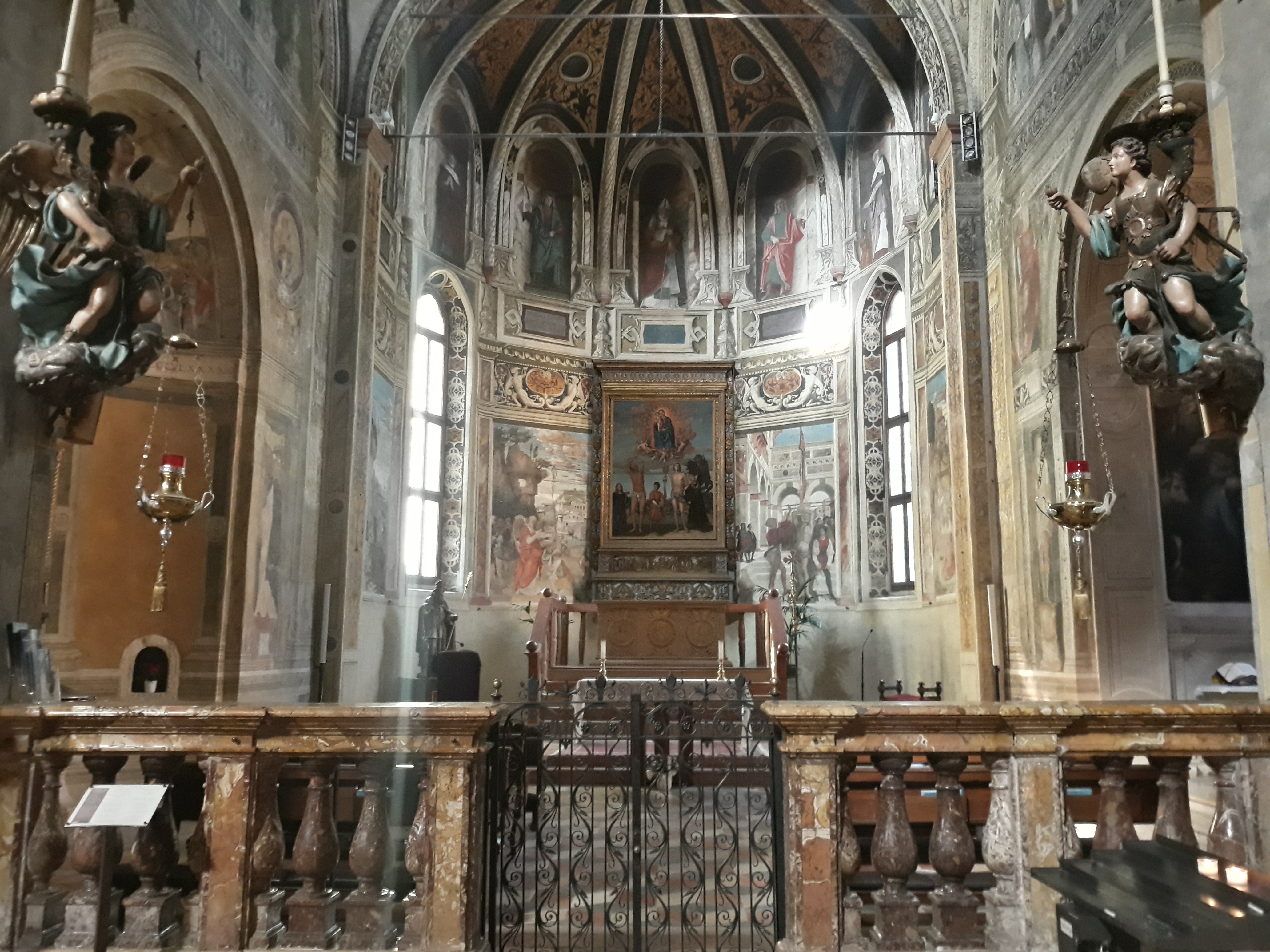 Cappella di San Biagio presso al chiesa di San Nazaro e Celso a Verona